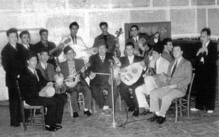 Orchestre arabo-andalou de Cheikh Sadek El Béjaoui - Algérie